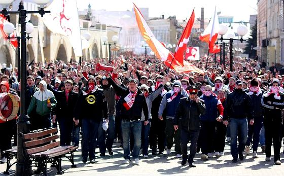 Самый массовый проход болельщиков красно-белых в Казани перед матчем с "Рубином". 2009 год